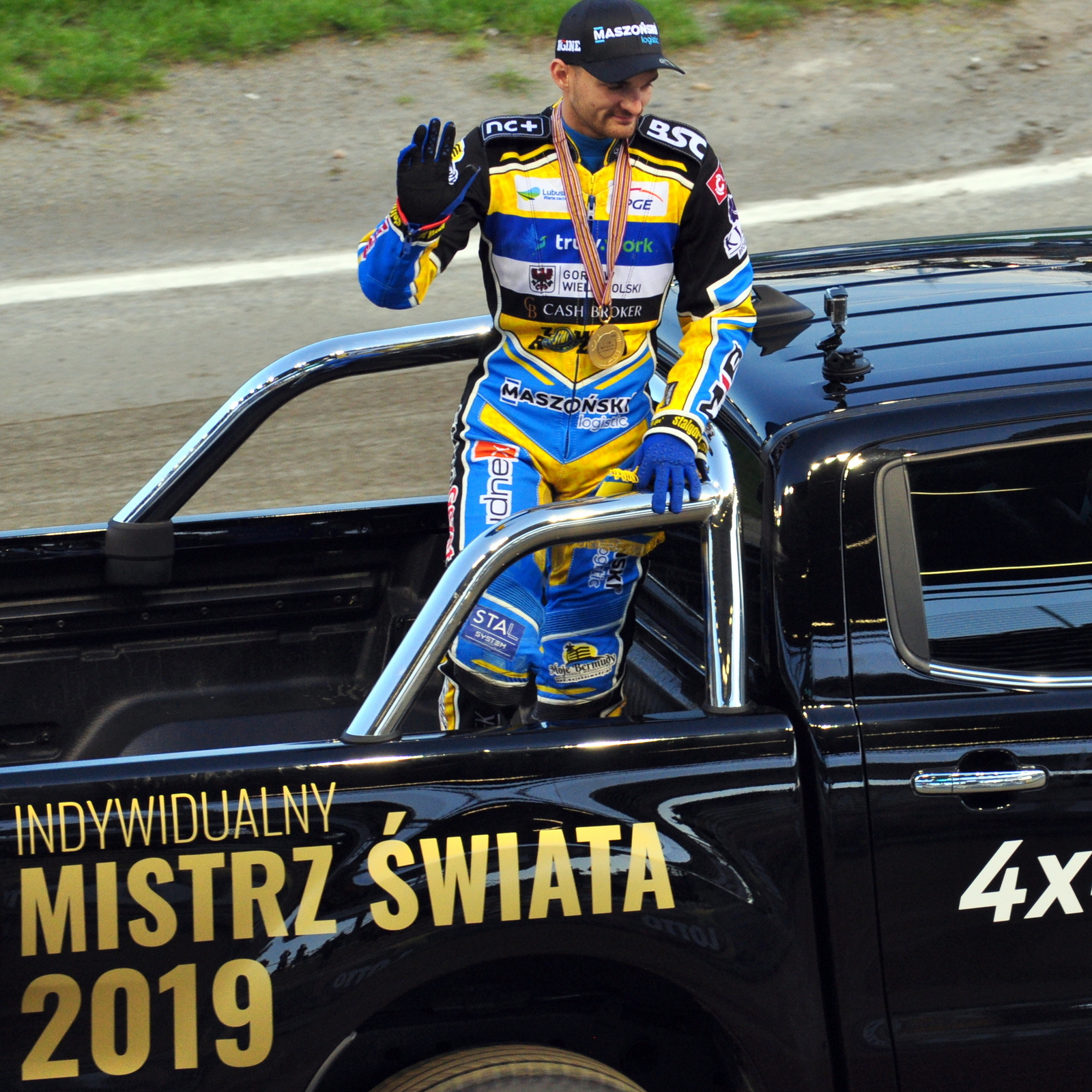 Bartosz Zmarzlik najlepszym żużlowcem świata w 2019 r. Nazajutrz, po zdobyciu tytułu, powitanie na stadionie w Gorzowie Wlkp. podczas meczu barażowego z drużyną Arged Malesa Ostrovia Ostrów.